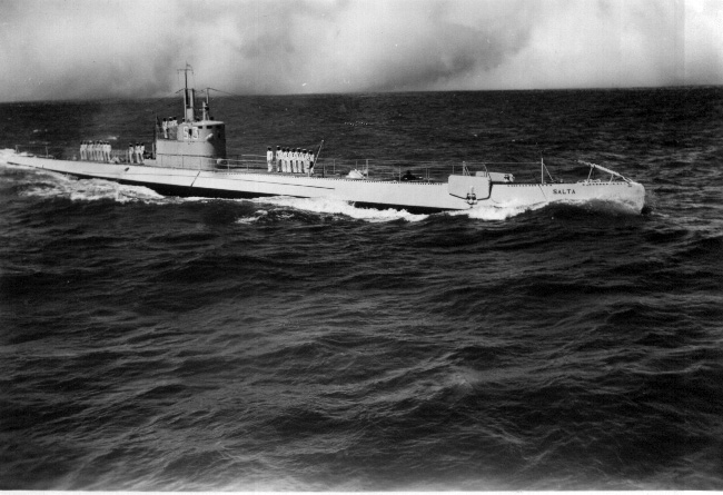 Submarino argentino ARA Salta (S-3), luego S-2